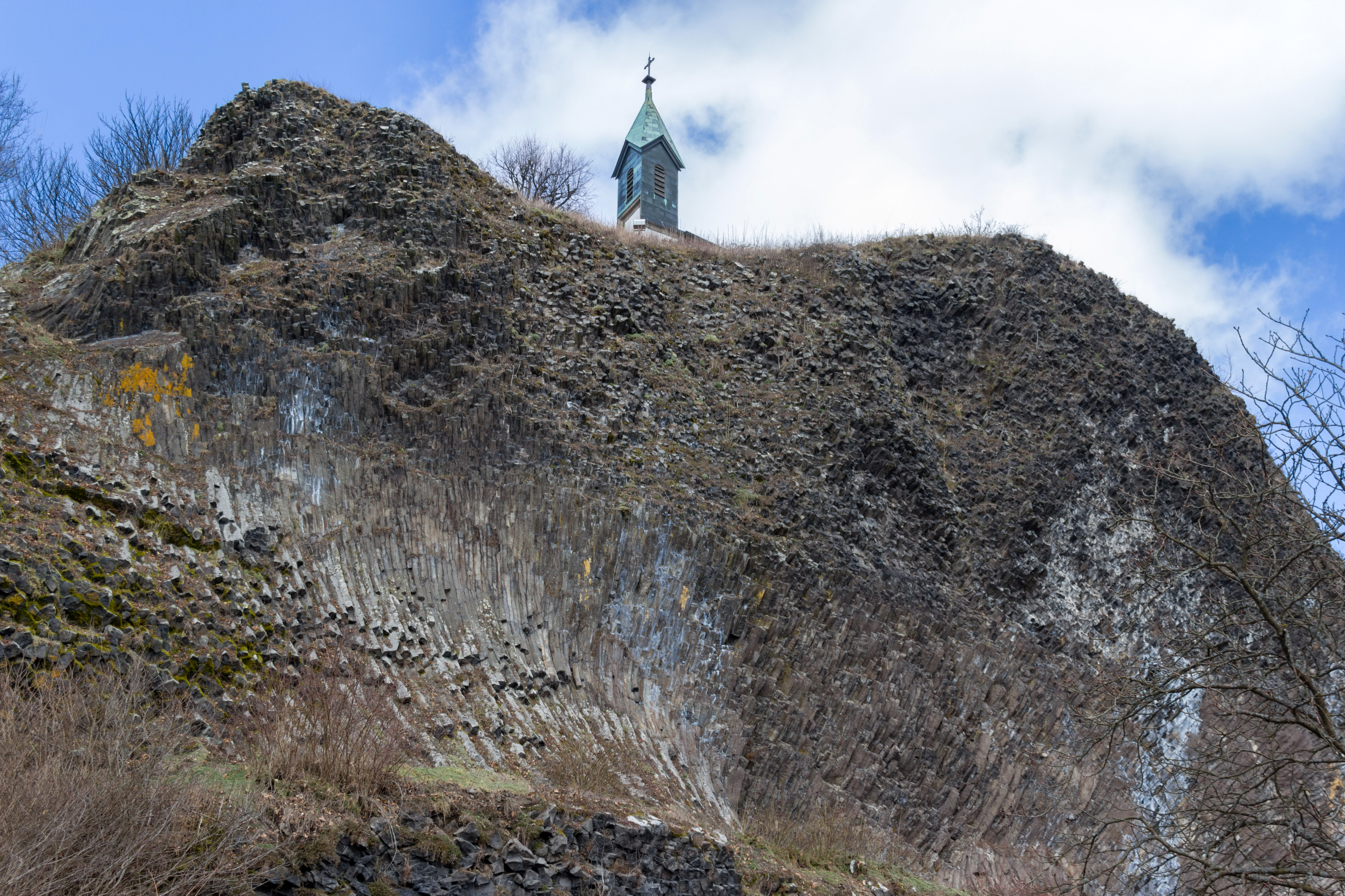 Basaltkegel Parkstein, Naturschutz- und FFH-Gebiet Parkstein